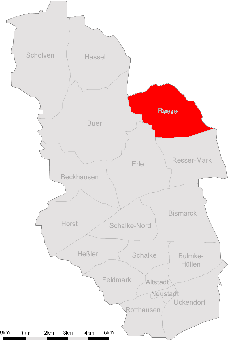 Beschreibung: Von Marc Schuelper erstelle Karte von Gelsenkirchen mit den 18 Stadtteilen. Stadtteil Beckhausen markiert. Description: By Marc Schuelper provided map of Gelsenkirchen with its 18 quarters. Highlighted quarter Beckhausen.